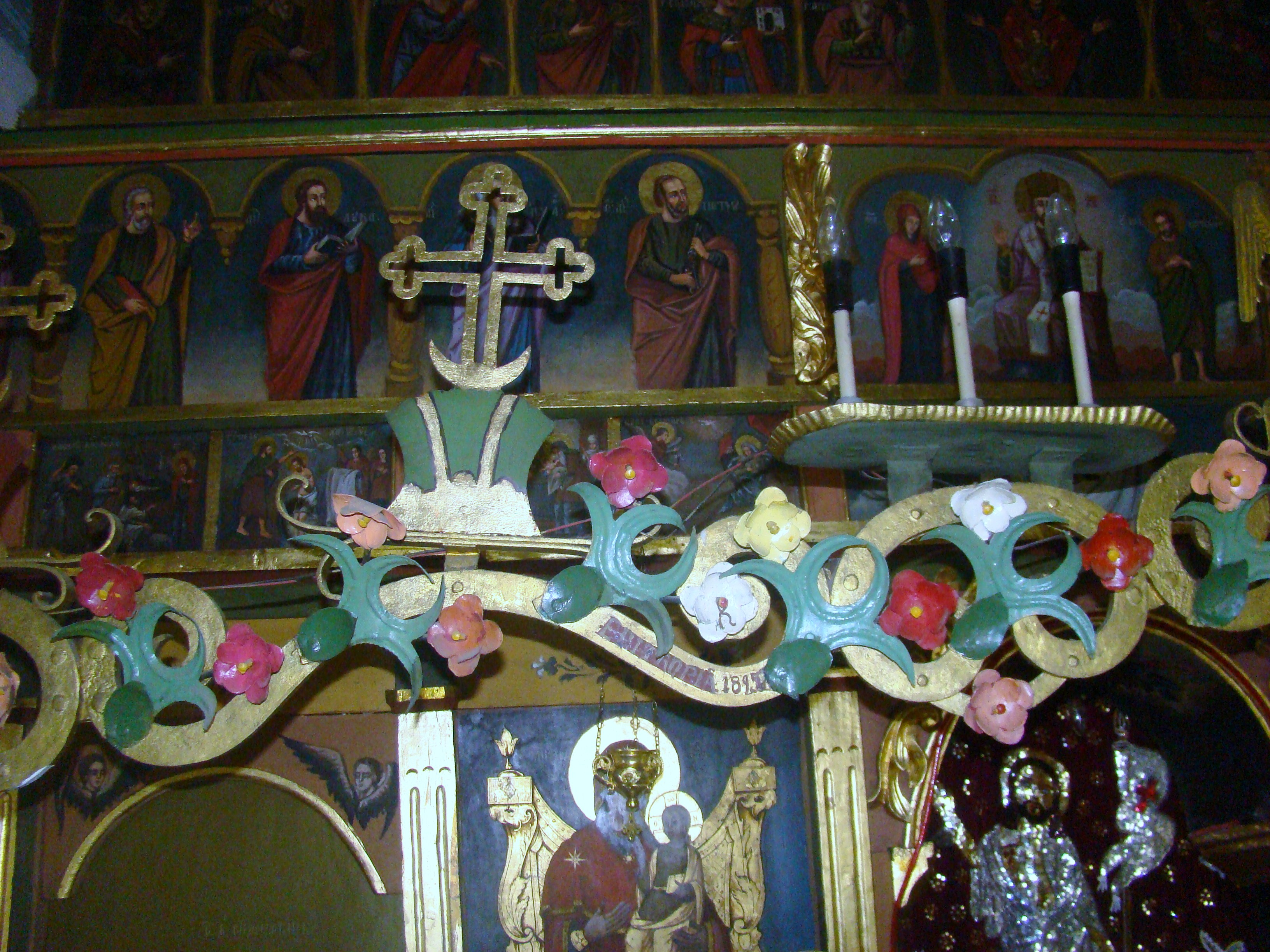 Negoiești, Bacău